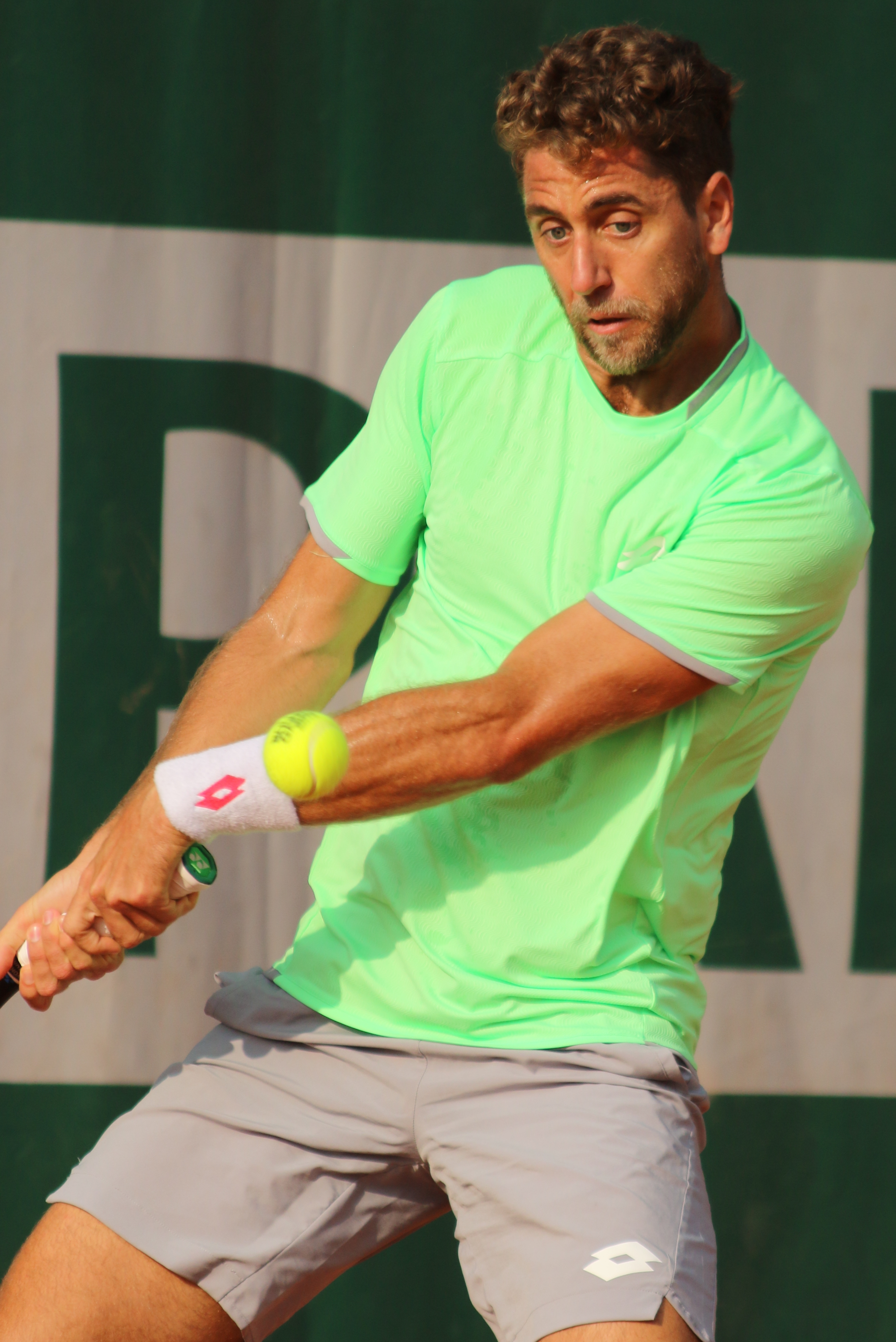 Quiroz RGQ19 (49)